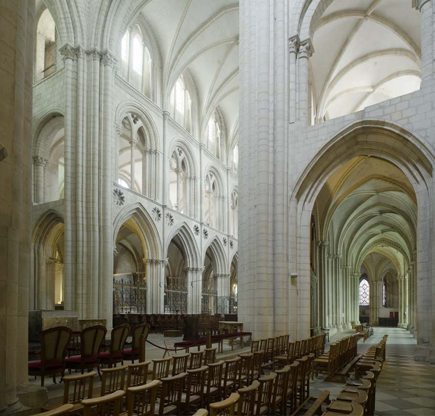 This building is en partie classé, en partie inscrit au titre des Monuments Historiques. .